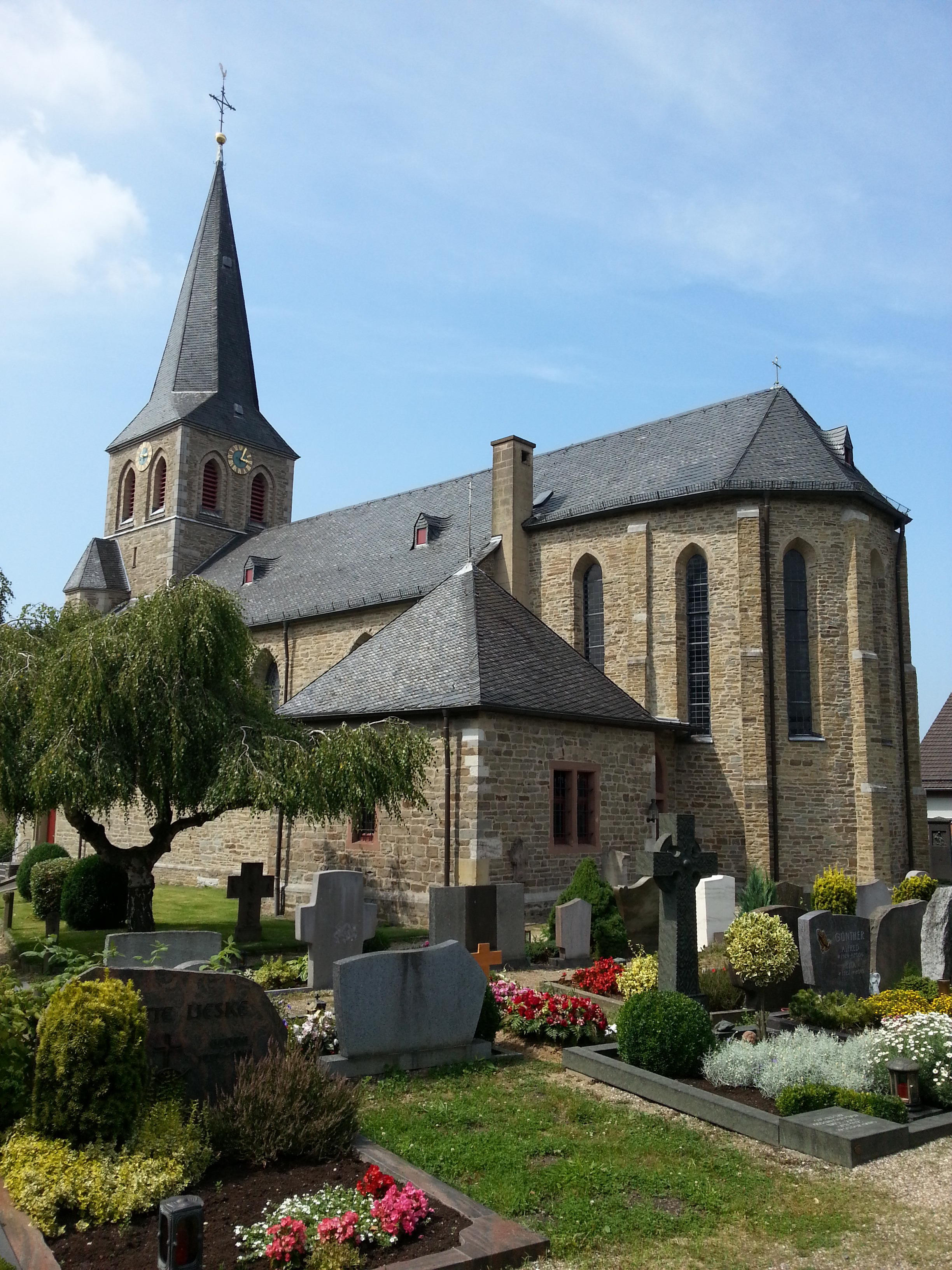 Birk Sankt Mariä Geburt von Osten